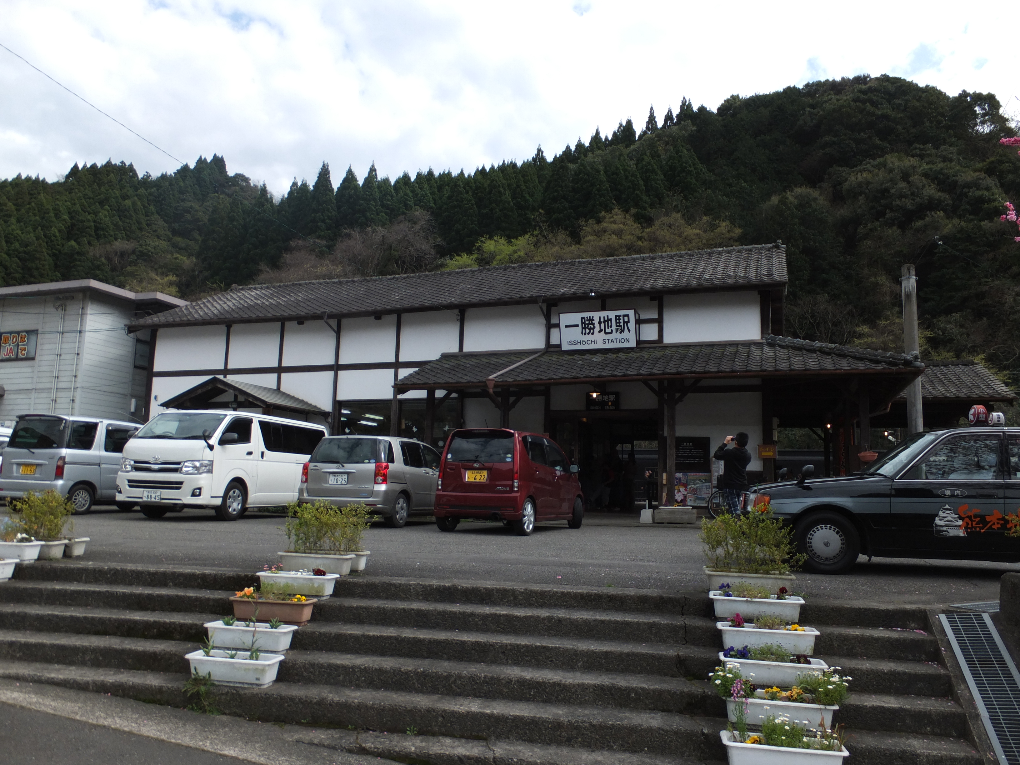 一勝地駅駅舎